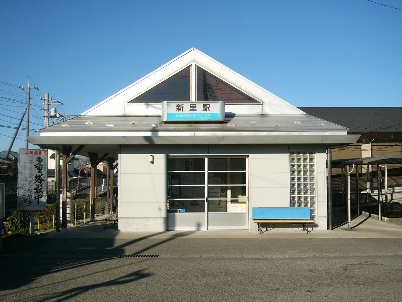 Niisato Station